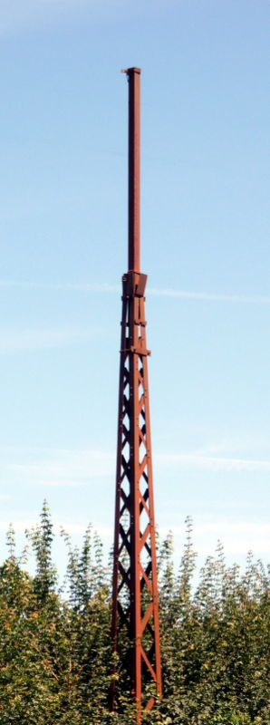 Im Jahre 2016 in Lisdorf noch vorhandener Oberleitungsmast der ehemaligen Kleinbahn Ensdorf-Saarlouis-Wallerfangen